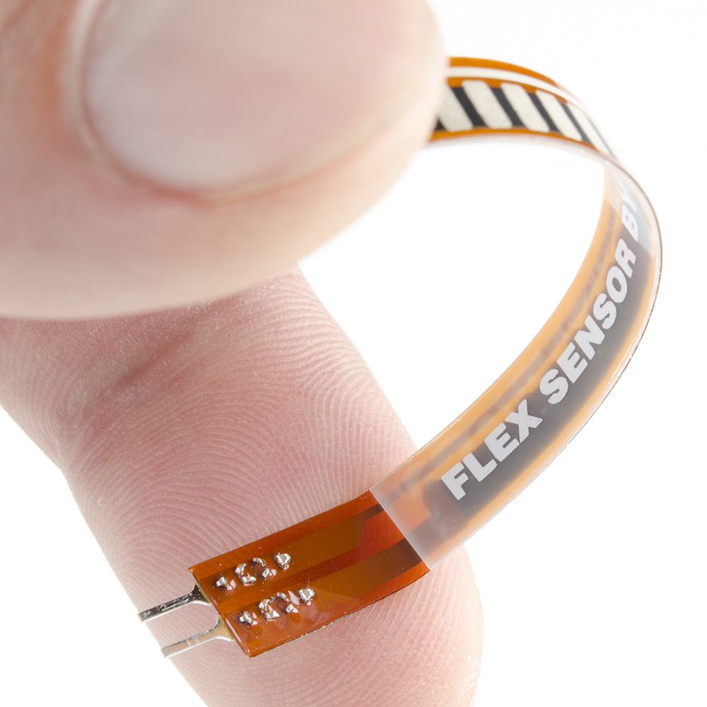 Flex Sensor